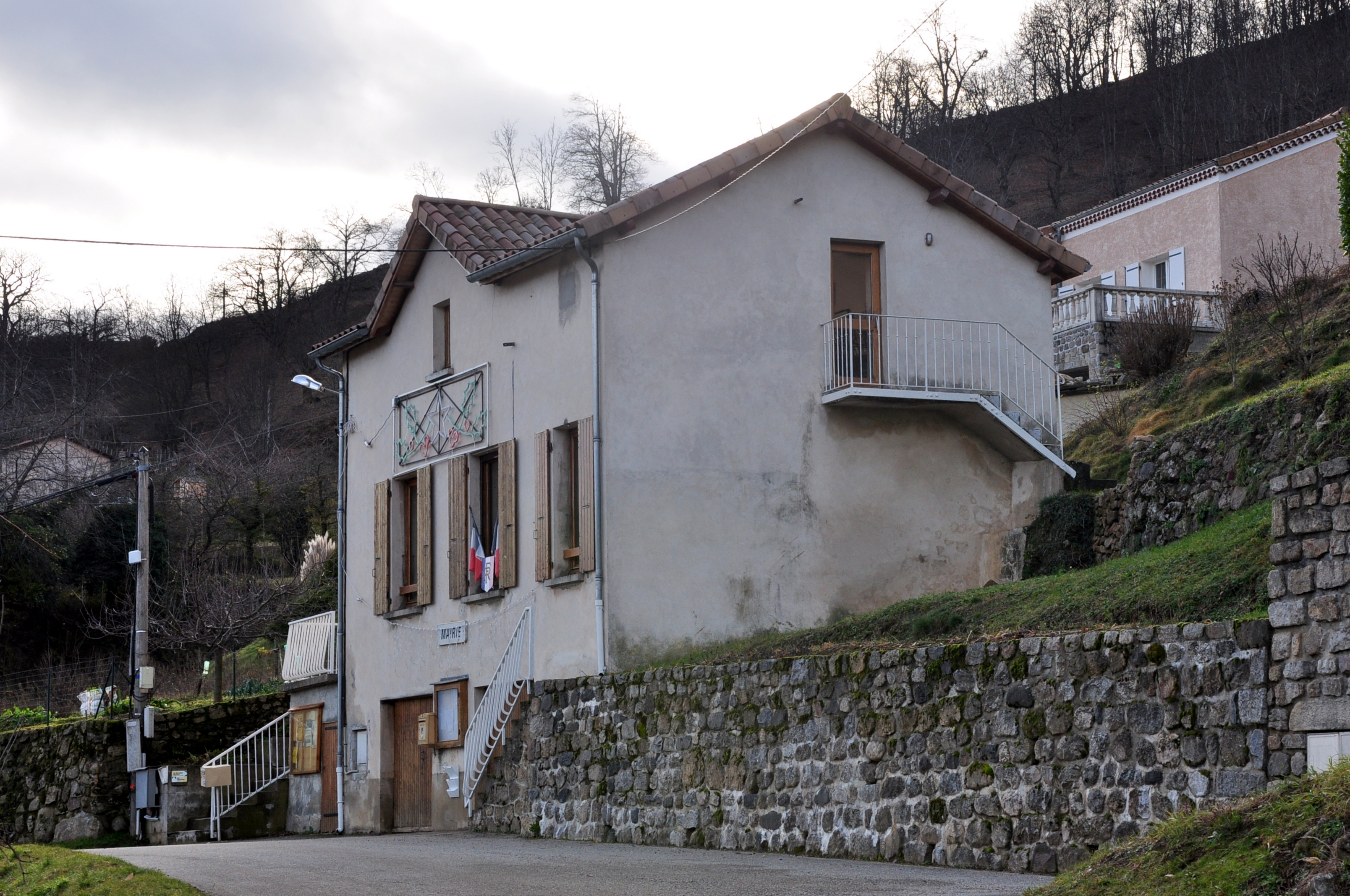 Marie de Jaunac.